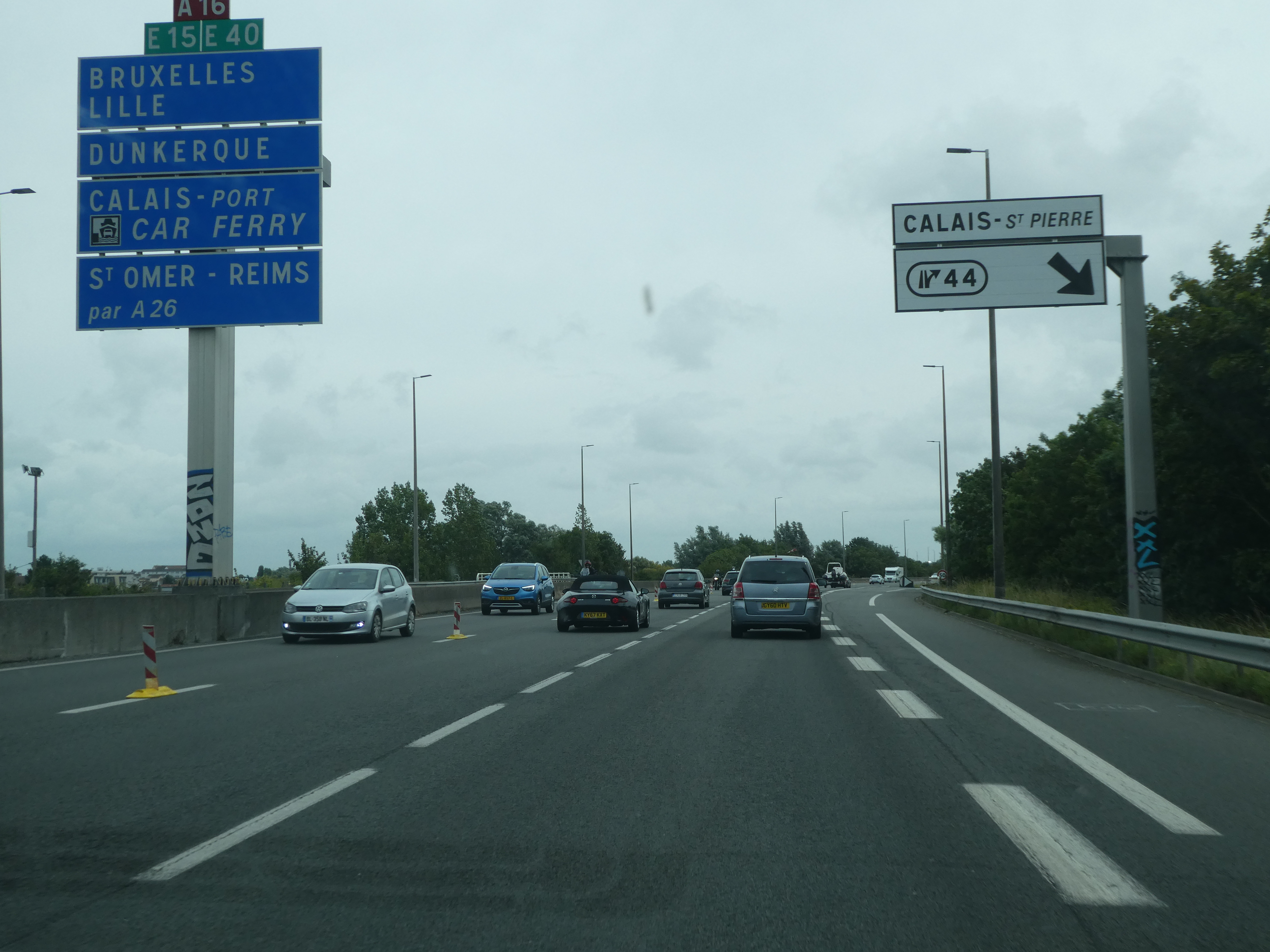 Sortie 44 sur l'autoroute A16, direction Sud-Nord